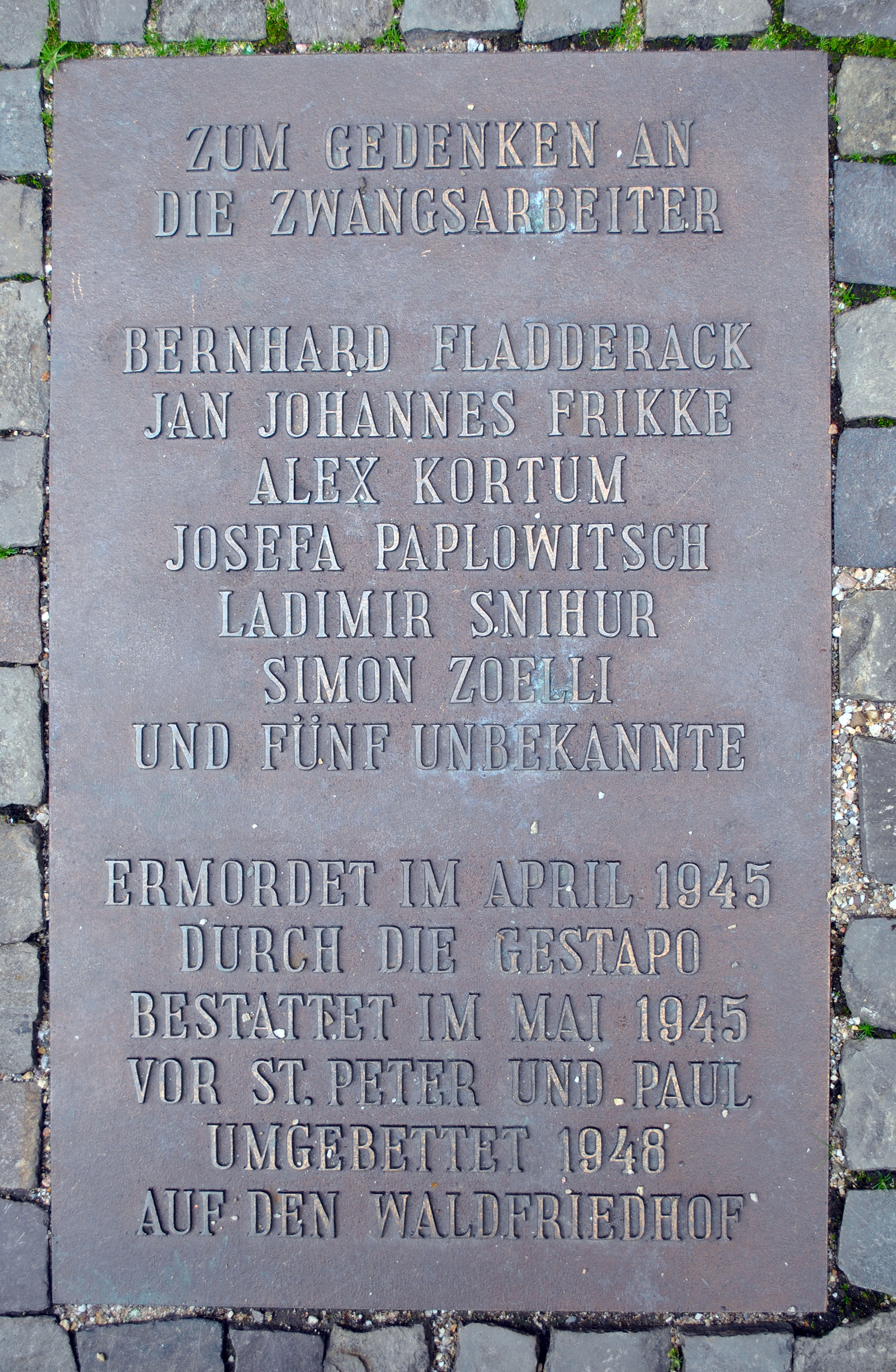 Gedenktafel an die in der Zeit der Naziherrschaft ermordeten Zwangsarbeiter in Ratingen